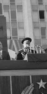 Chisinau.